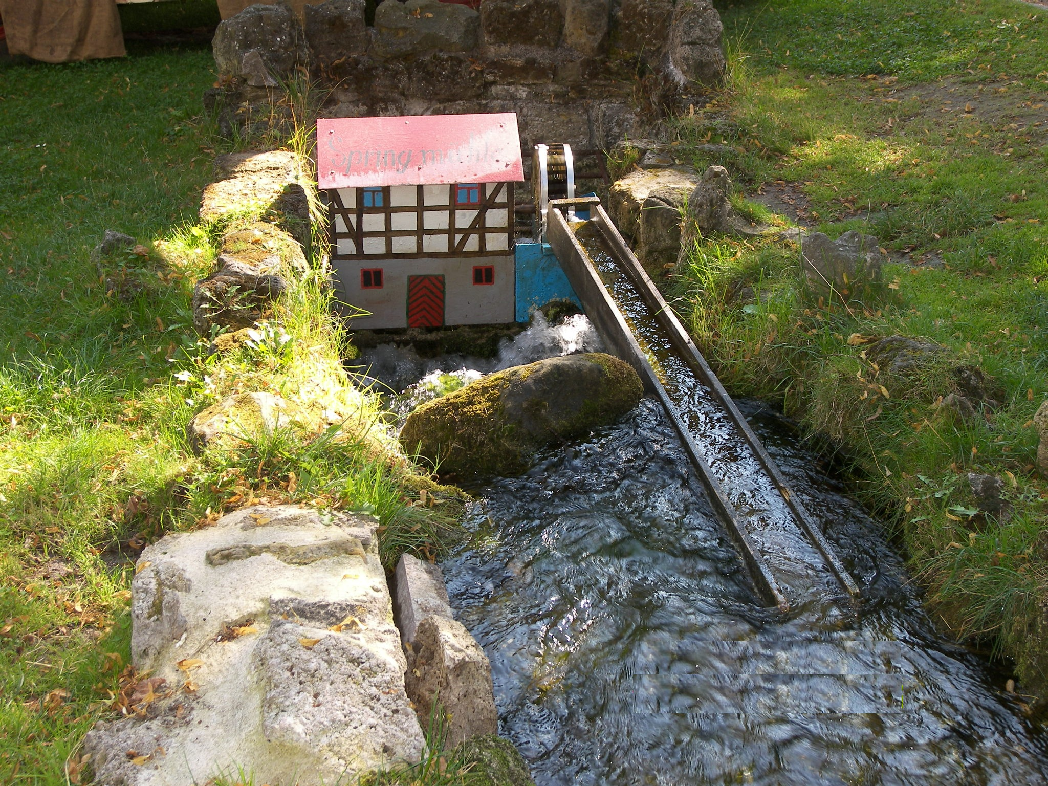 Miniatur Mühle am Mühlberger Spring in Thüringen (Bachabwärts)